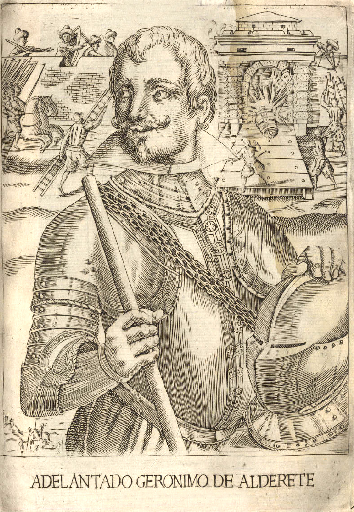 Jerónimo de Alderete: someone spaniard Chile's conqueron //uno de los conquistadores españoles de Chile.